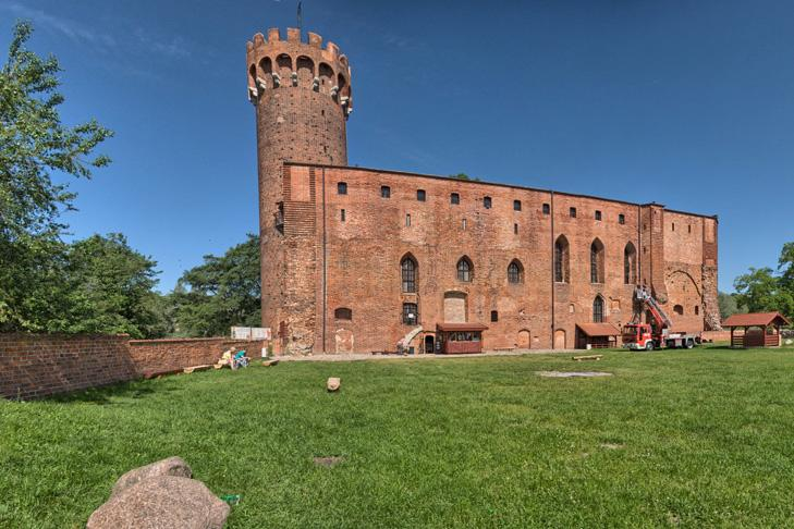 Świecie zamek